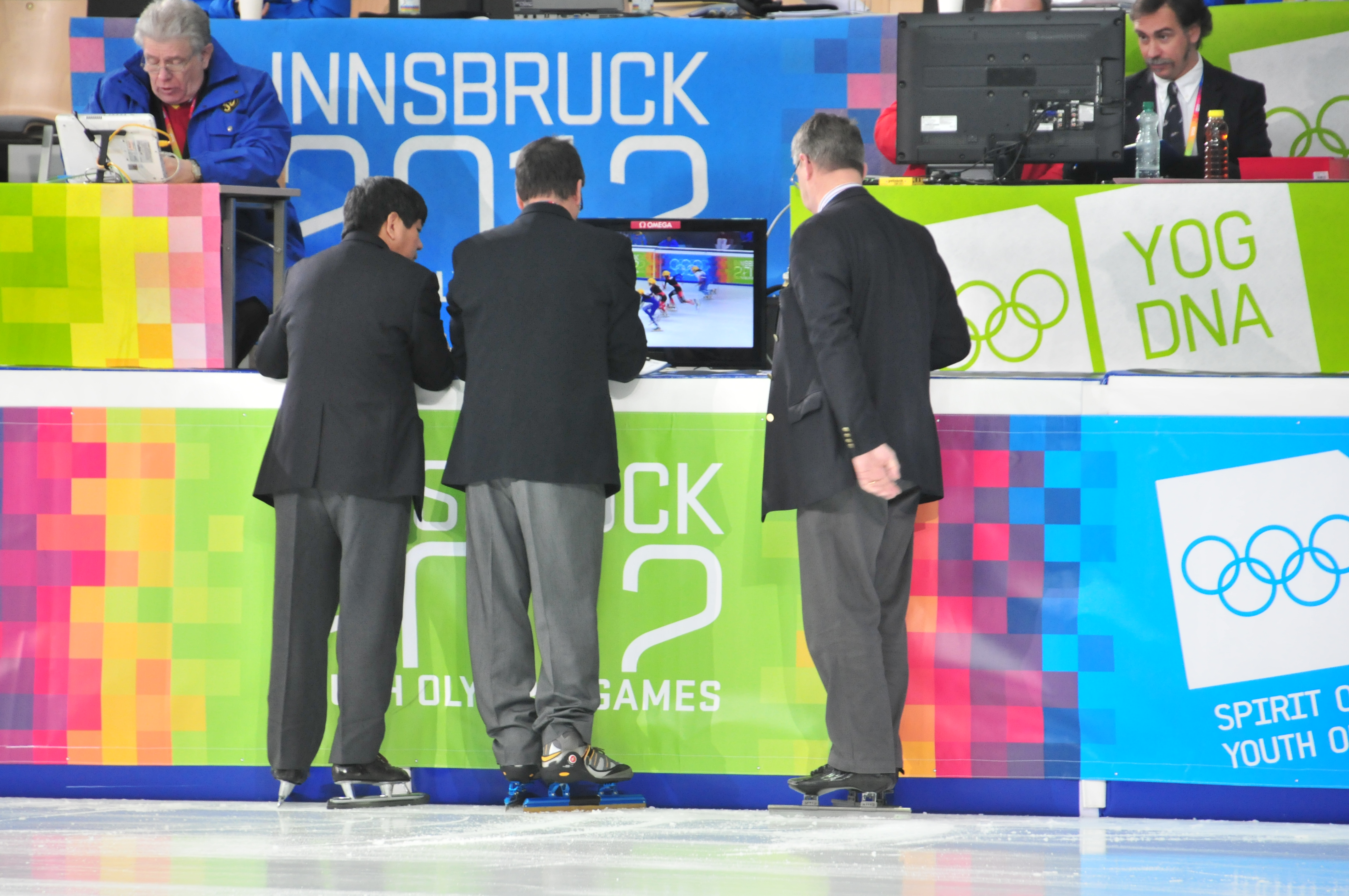 1. Jugendolympiade 2012 Innsbruck Erste Olympische Jugend- Winterspiele 201213. bis 22. Jänner in Innsbruck Dieses Foto wurde durch die Unterstützung von Wikimedia Österreich und die Twoonix Software GmbH ermöglicht.